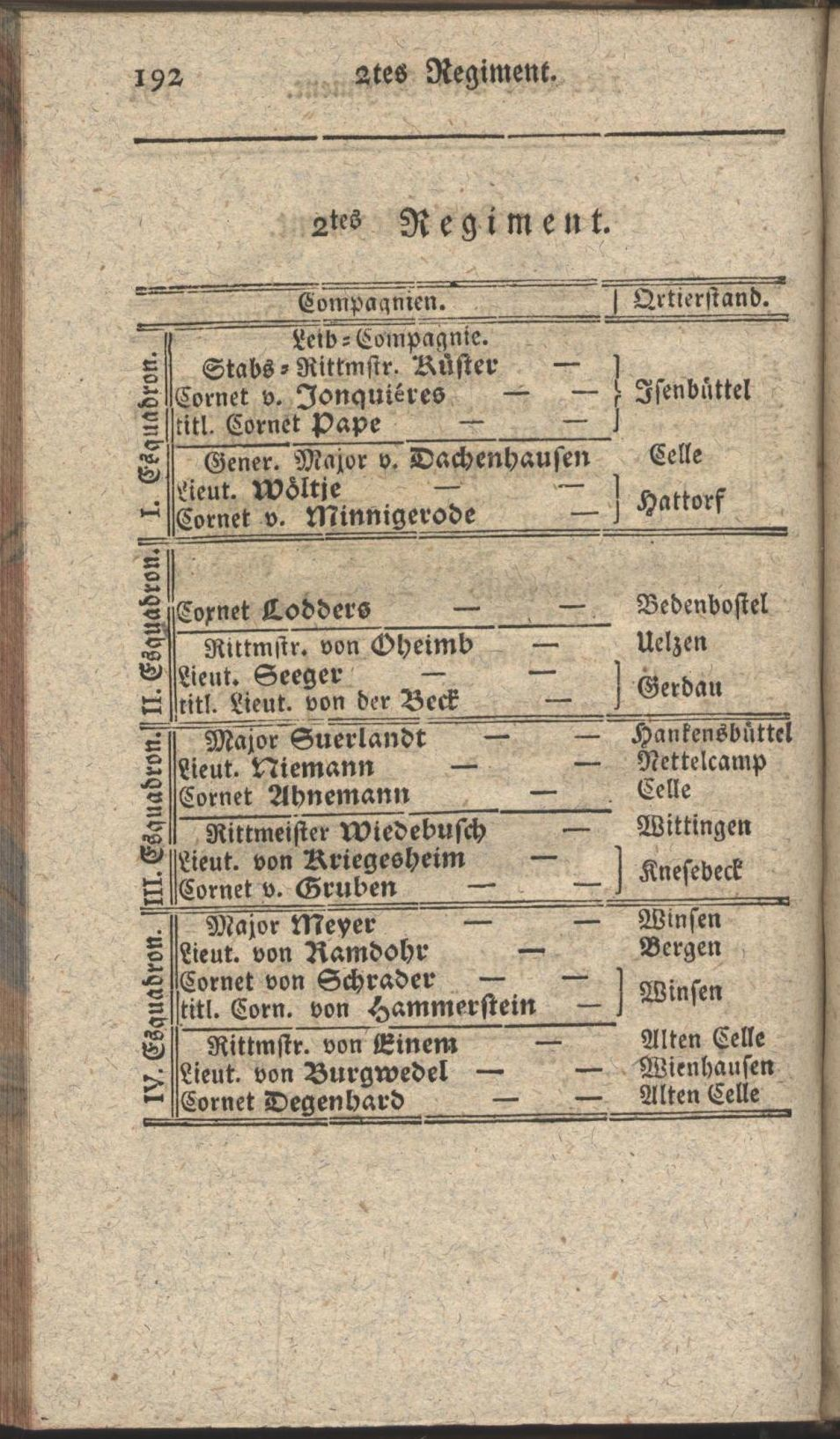 garnison 2th hanoverian cav rgt in 1791